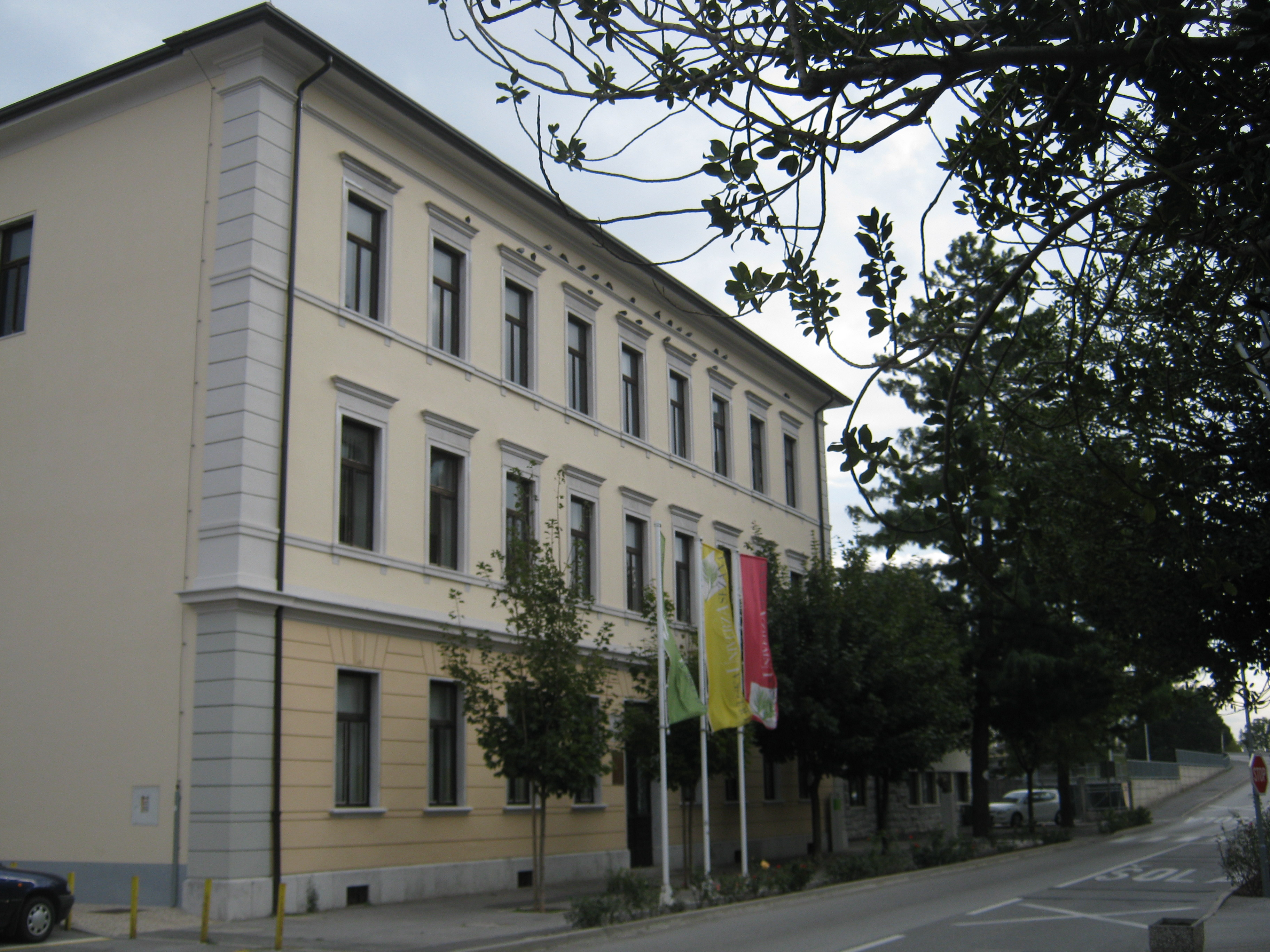 Rojstna hiša Srečka Kosovela v Sežani